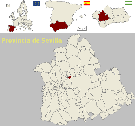 Mapa de localización del municipio sevillano de Brenes (Andalucía, España)